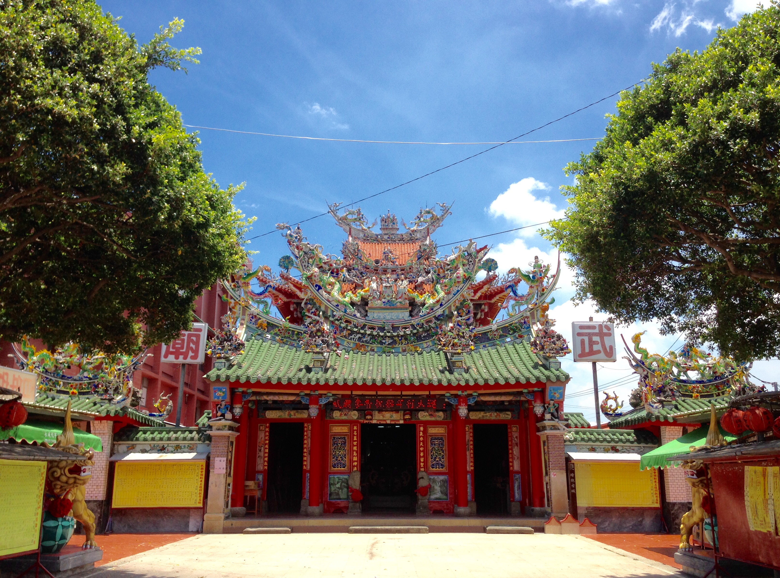 台南鹽水武廟